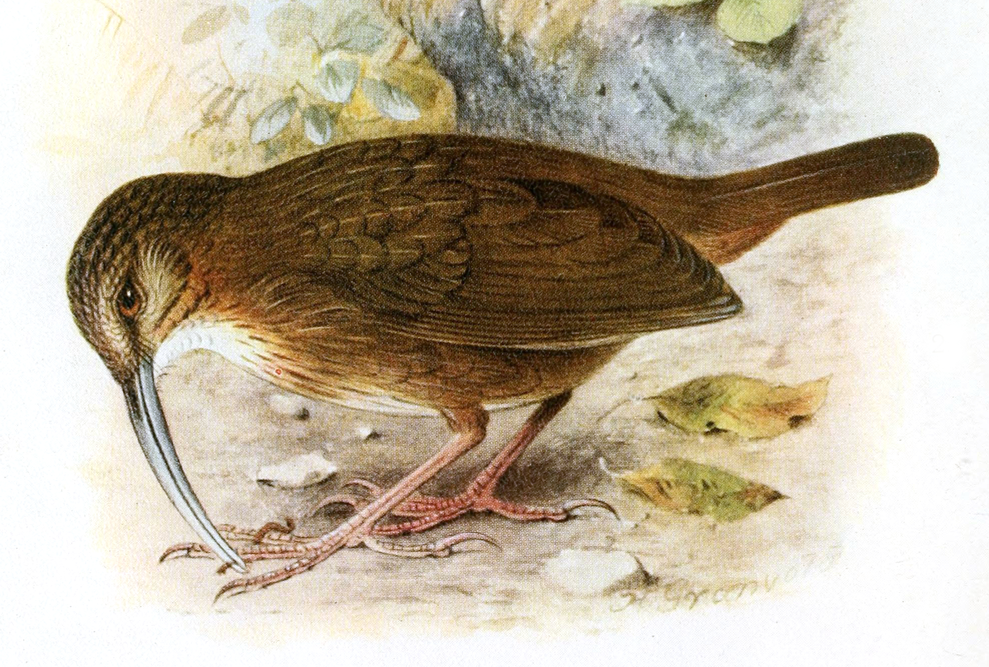 Rimator danjoui